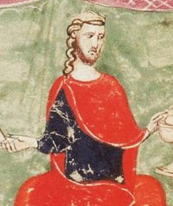 Pedro el Grande.